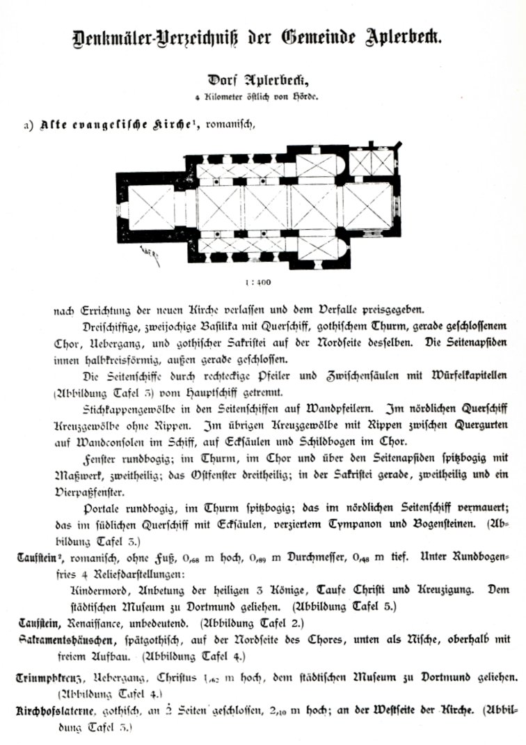 Dortmund, Aplerbeck, Kirche evangelisch romanisch